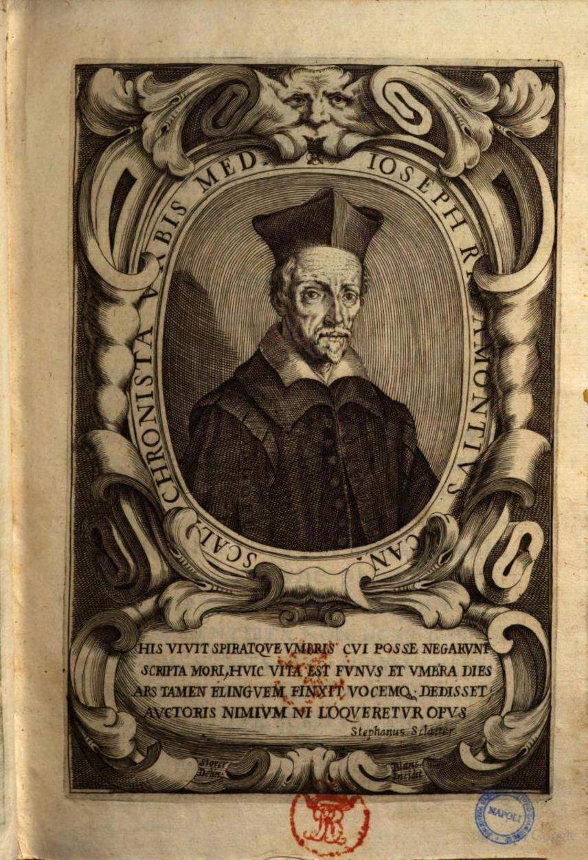 Giuseppe Ripamonti, Ioseph Ripamontius